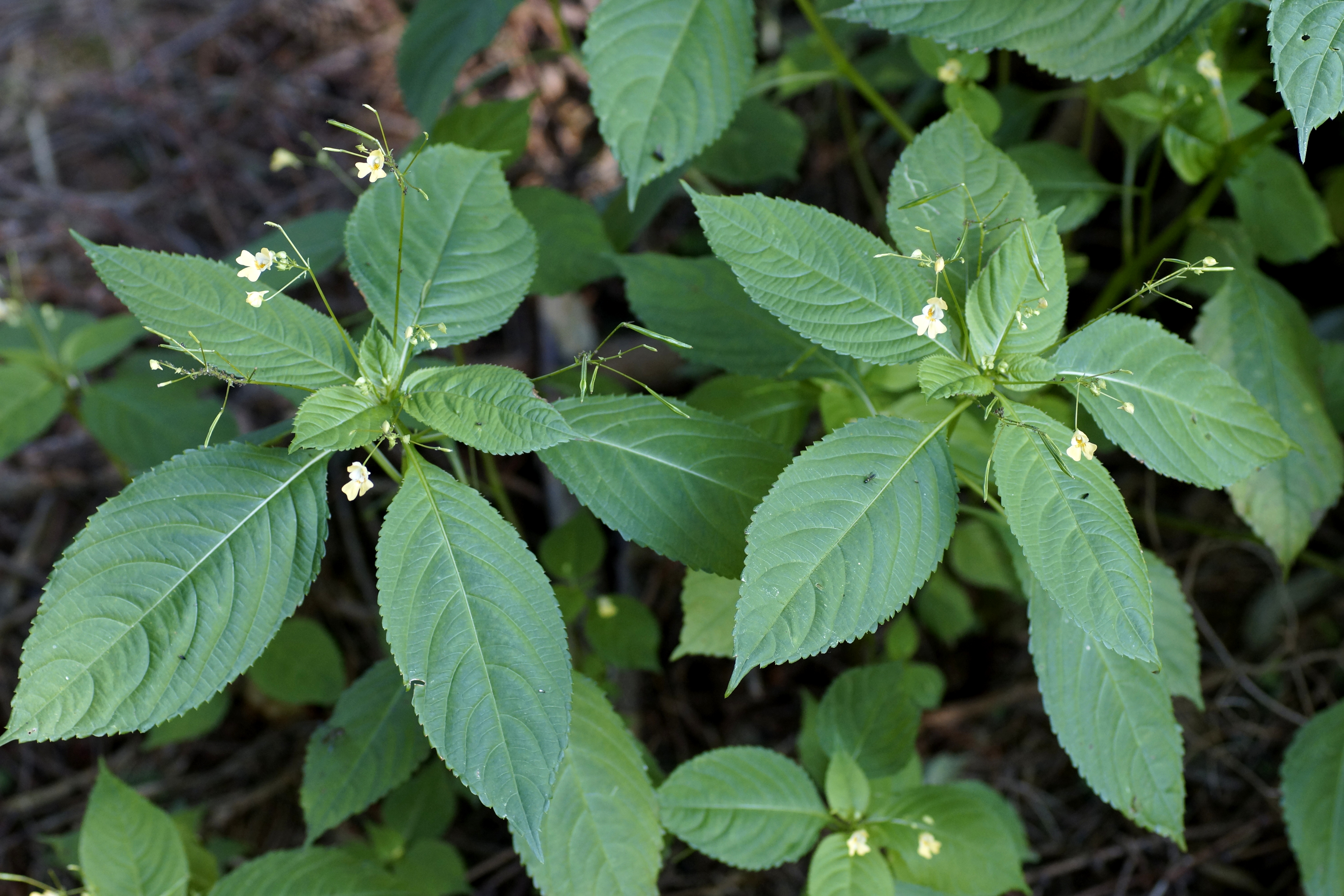 Kleinblütiges Springkraut, Balsaminaceae, Deutschland, Bayern, Oberfranken, Selbitz Foto: U.Schmidt, VII.2012